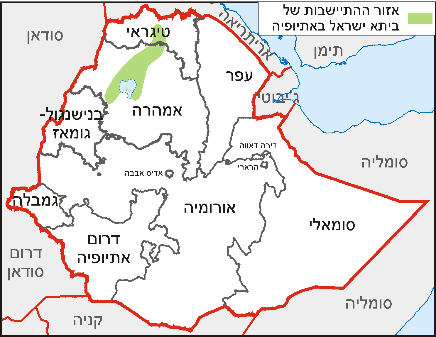 Ethiopia map - falasha